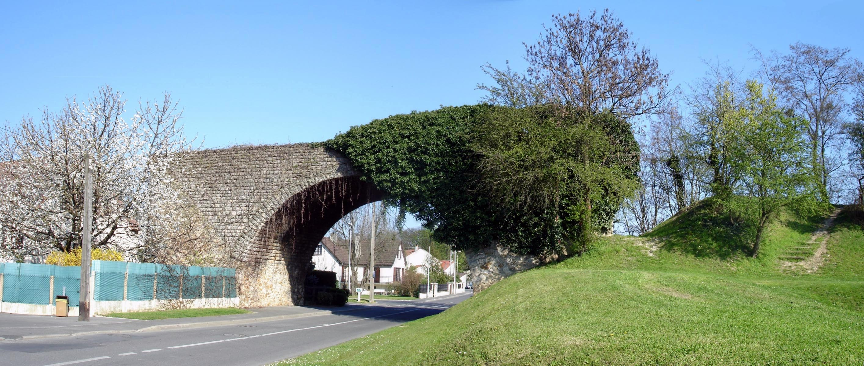 Pont de la ligne Aulnay - Rivecourt, chemin de Savigny à Villepinte (Seine-Saint-Denis), France Les travaux de la ligne de chemin de fer furent interrompus par la Première Guerre mondiale et ne furent jamais achevés, les ouvrages d'art seuls ayant été partiellement réalisés. Avril 2007 Photo personnelle (own work) de Clicsouris